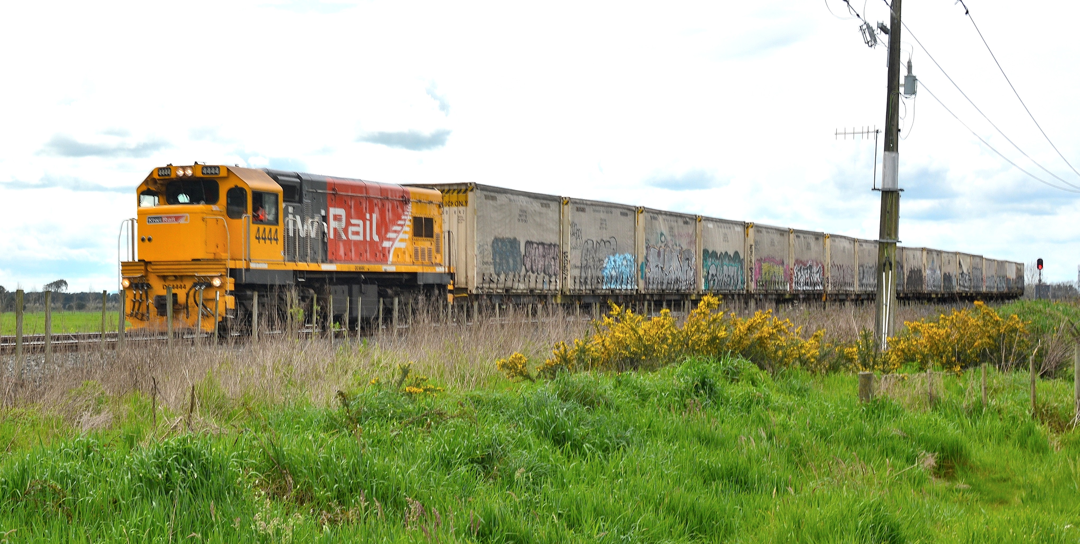 Eureka,Waikato,New Zealand